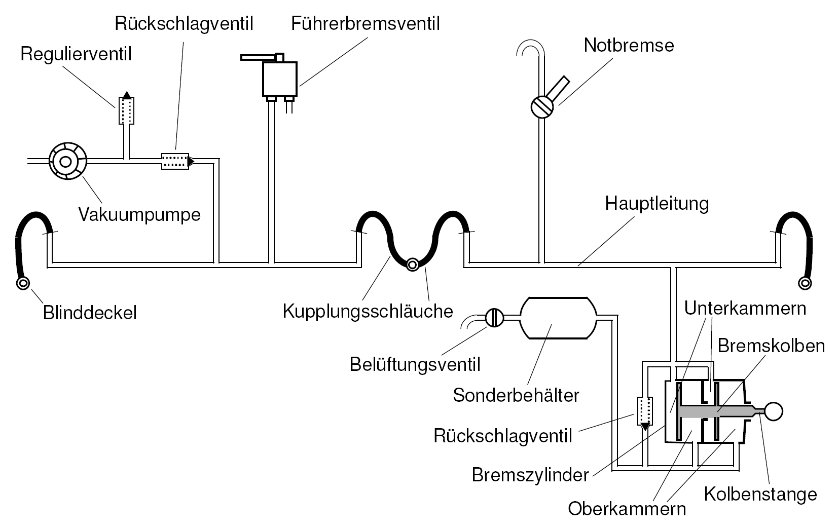 Fahrzeuge mit Vakuumbremse, auch Luftsaugebremse genannt, sind mindestens ausgerüstet mit Hauptleitung, Bremszylinder mit Unter- und Oberkammer, Sonderbehälter und Rückschlagventil zwischen Sonderbehälter und Unterkammer des Bremszylinders. Triebfahrzeuge sind zusätzlich ausgerüstet mit Vakuumpumpe mit Rückschlagventil und Führerbremsventil (Vakuumschieber).